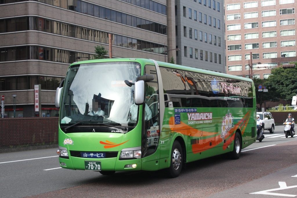 山一サービスのエアロエース